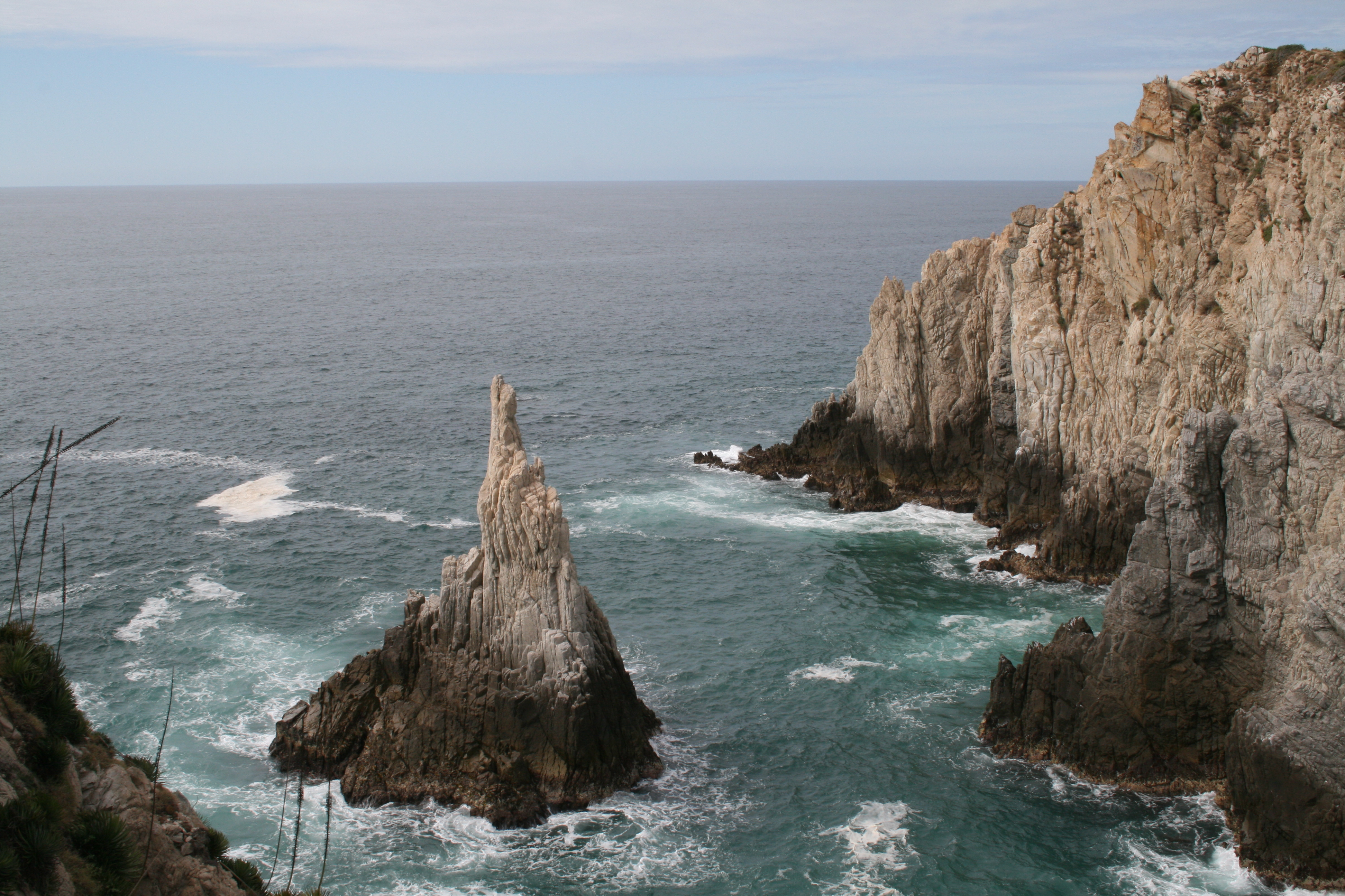 Playa de Maruata en México